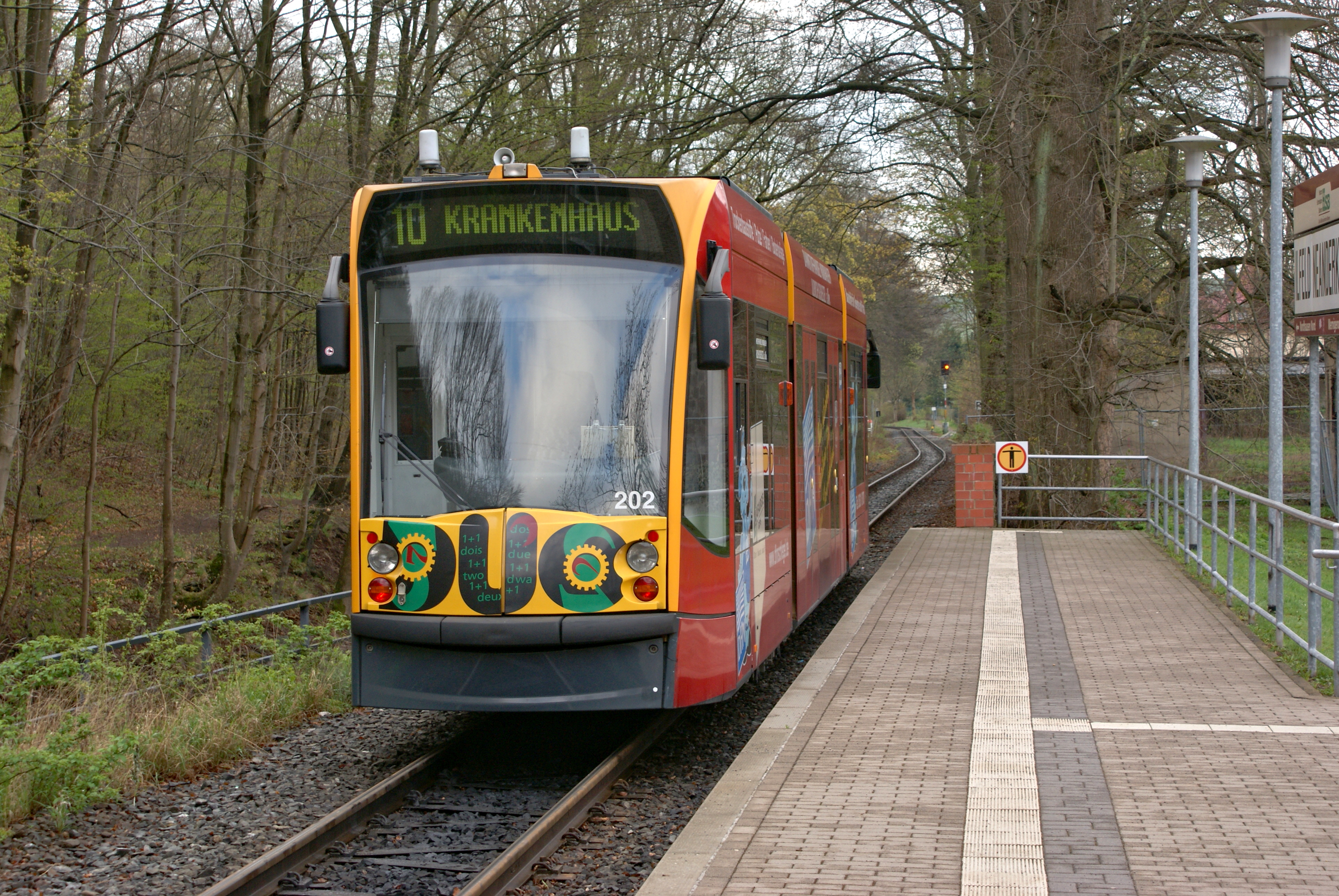 Siemens Combino Duo 187 202 (Tw 202 der SWN, Achsfolge B’B’), Siemens 2004, am Haltepunkt Ilfeld Neanderklinik der HSB am 23. April 2012